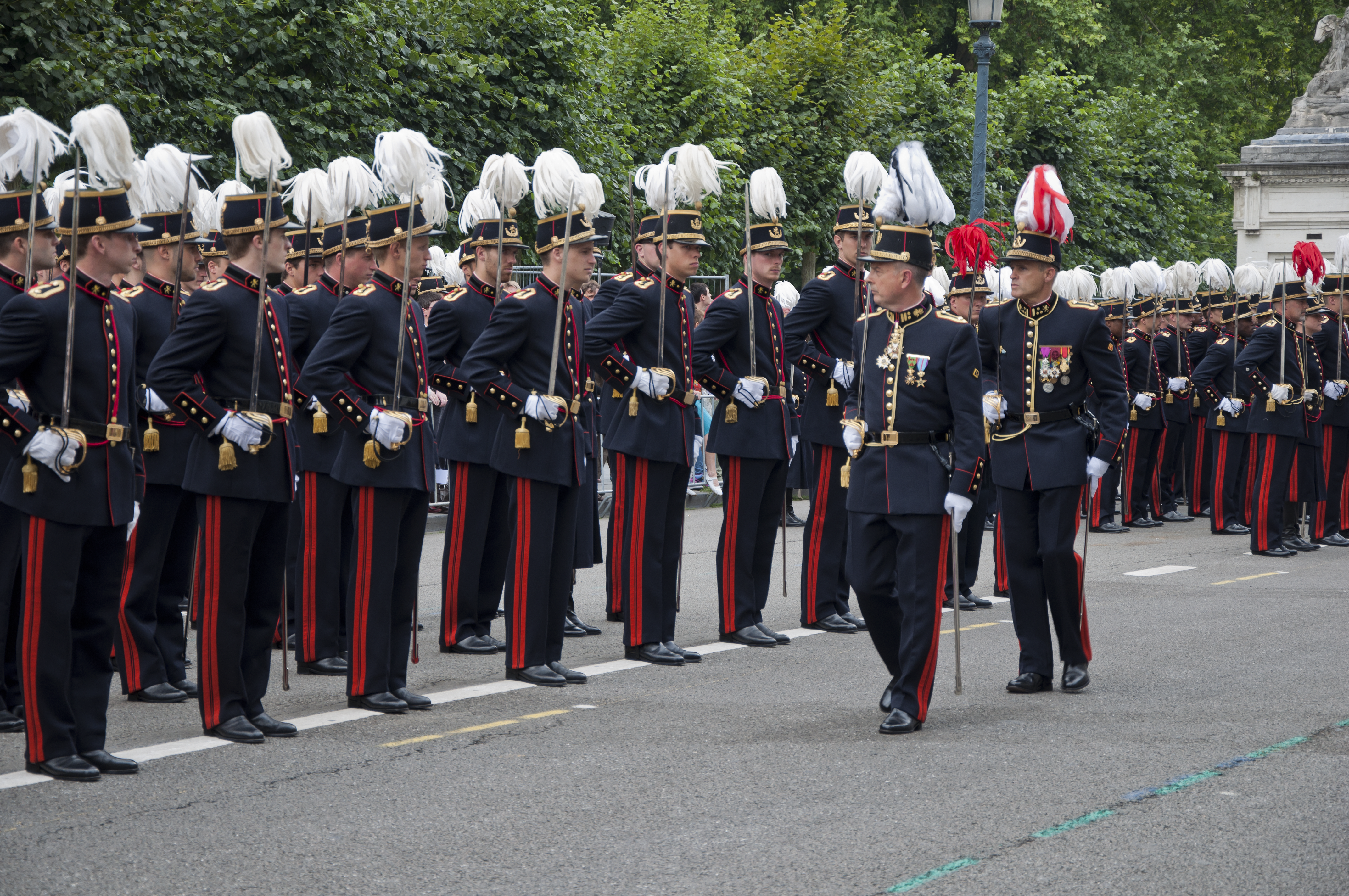 Leden van de Koninklijke Militaire School van België, met hun chef, generaal-majoor Harry Vindevogel tijdens het Nationaal Defilé op 21 juli 2011 te Brussel